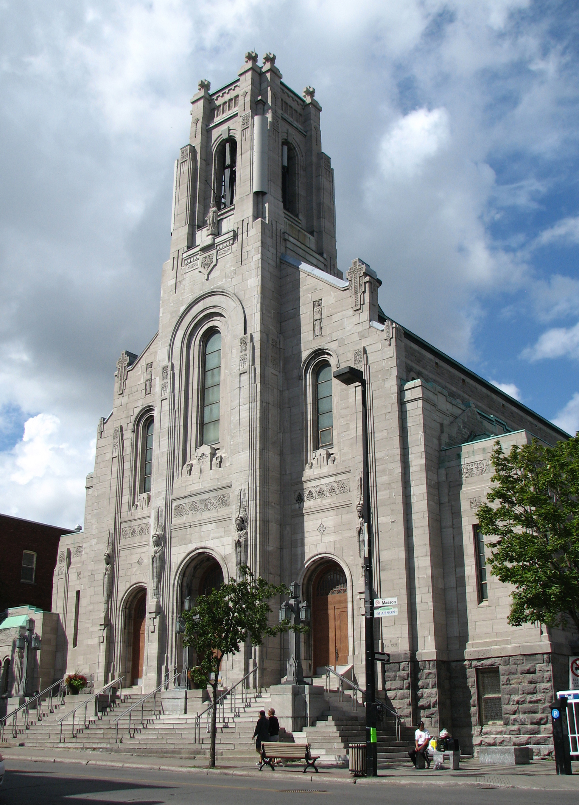 Église Saint-Esprit, sur la rue Masson, dans le quartier Rosemont à Montréal.